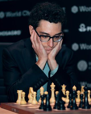 Фабиано Каруана, Турнир Претендентов 2018